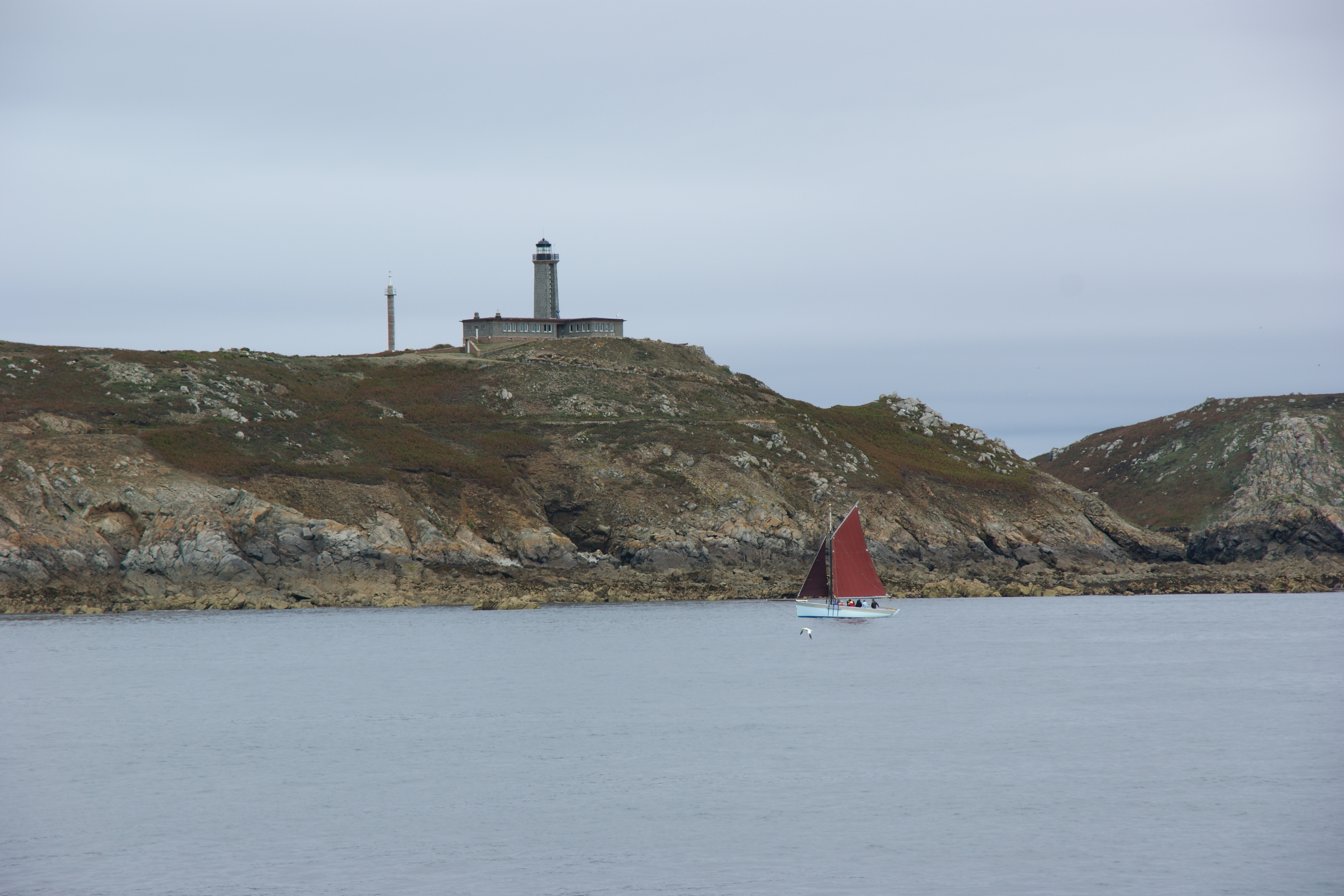 Le phare des Sept-Îles, sur lÎle aux moines